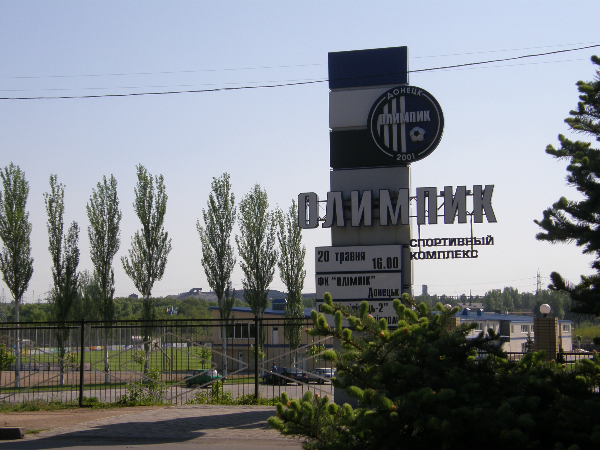 Ленинский район Донецка